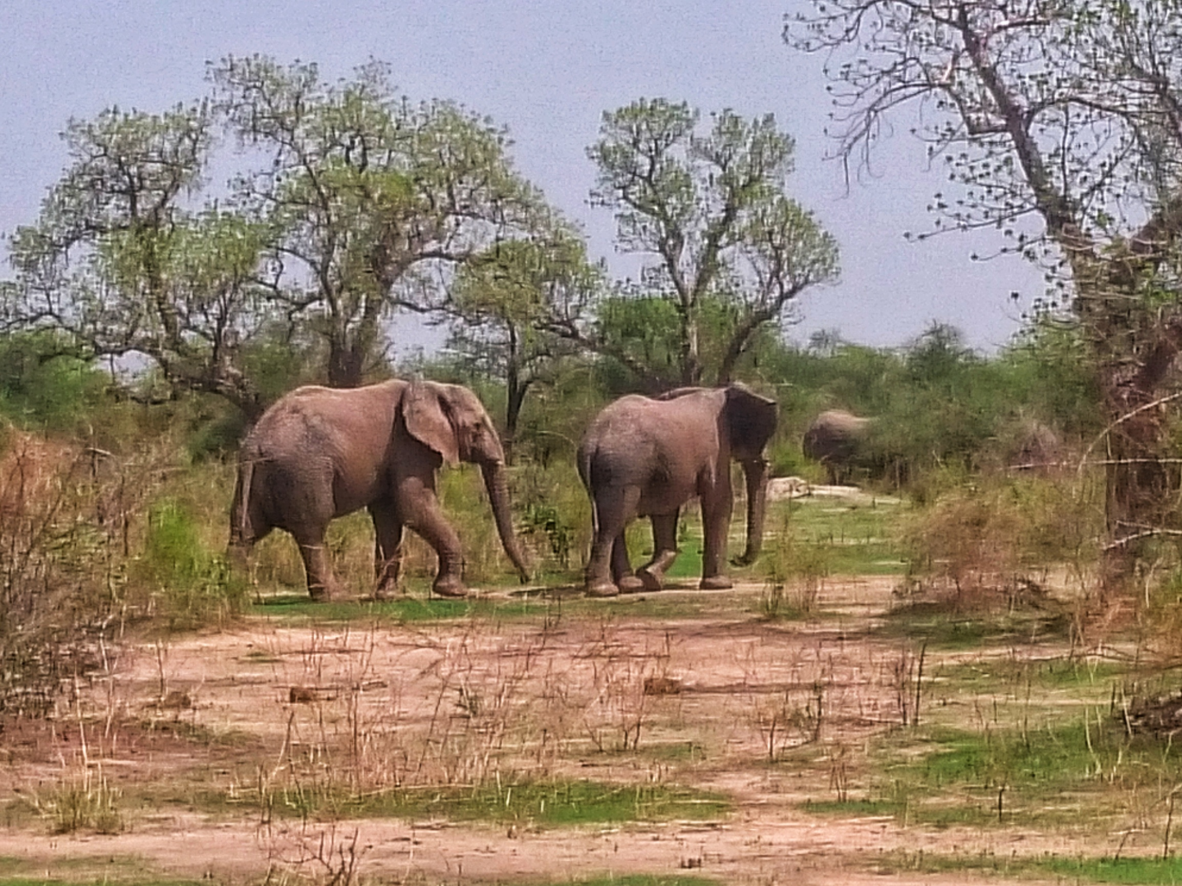 Les éléphants dans la réserve faunique de Kalfou. Localisation : Mayo-Danay, Extrême-Nord